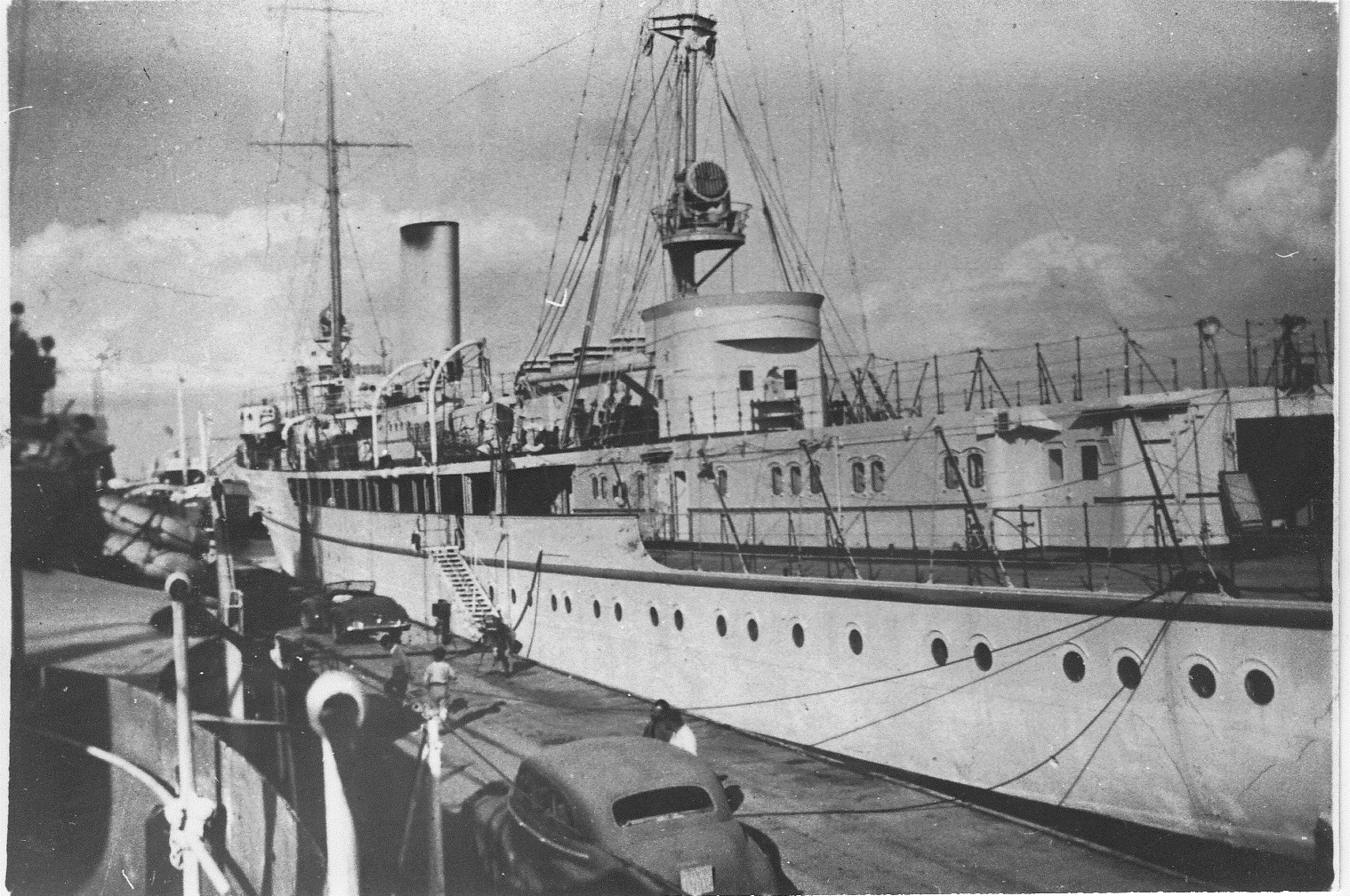 האונייה איגריס בנמל בירות